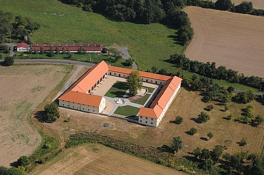 Letecký pohled na zrekonstruovaný poplužní statek Červený dvůr u Jenišovic